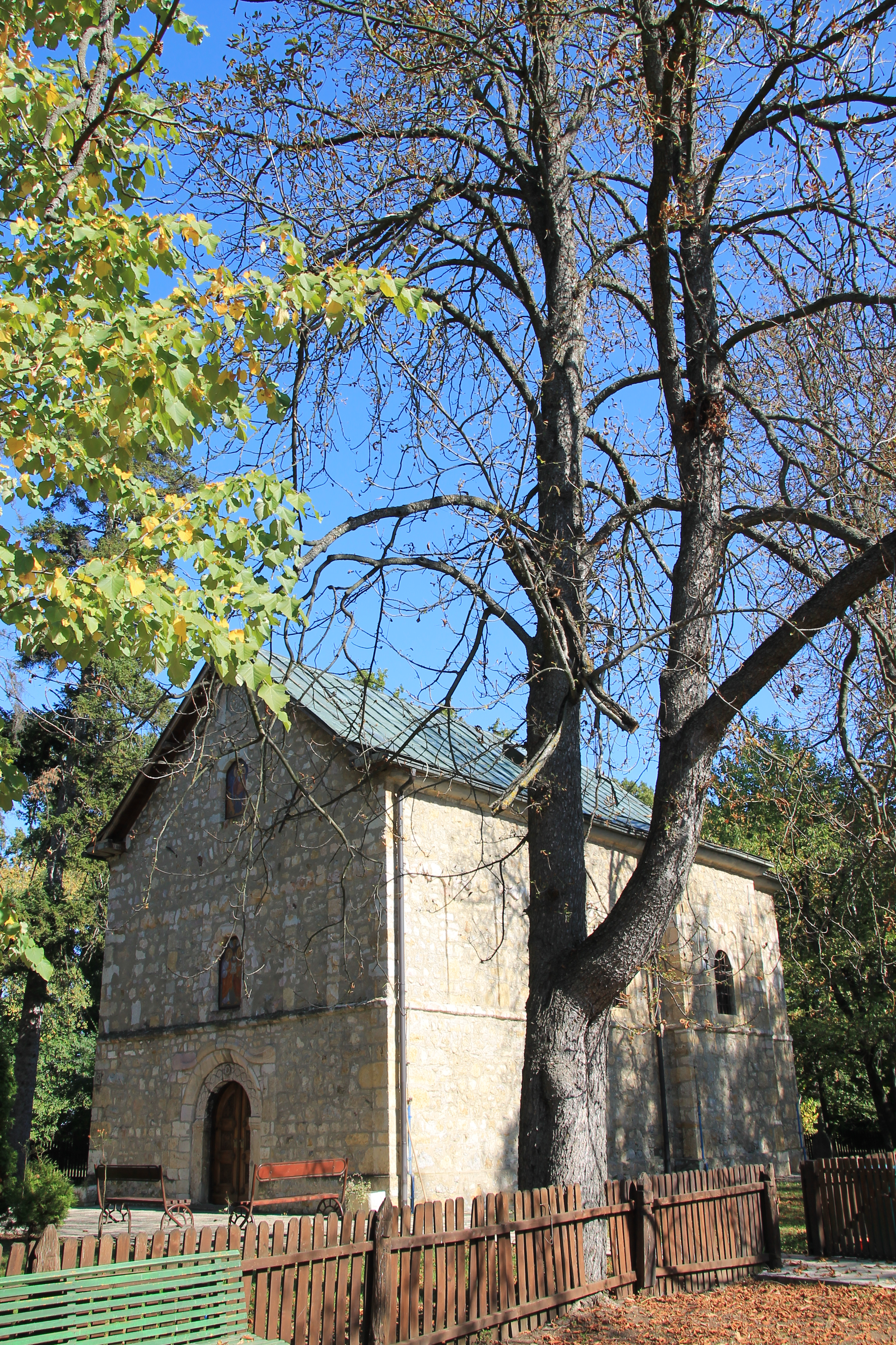 Crkva Sv. Petra i Pavla (Jagnjilo)